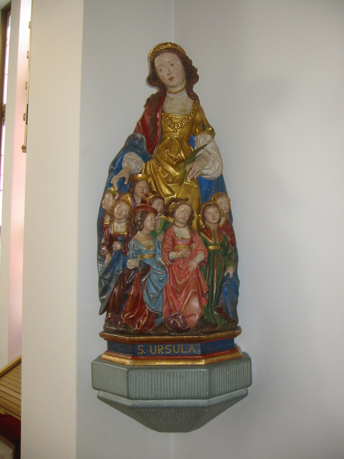 STatue der Heiligen Ursula in der St.-Ursula-Kirche in Graal-Müritz. Die Filialkirche gehört zusammen mit der Kirche St. Paulus in Marlow und der Pfarrkirche Maria-Hilfe der Christen St. Klara in Ribnitz-Damgarten zur Katholischen Kirche Ribnitz